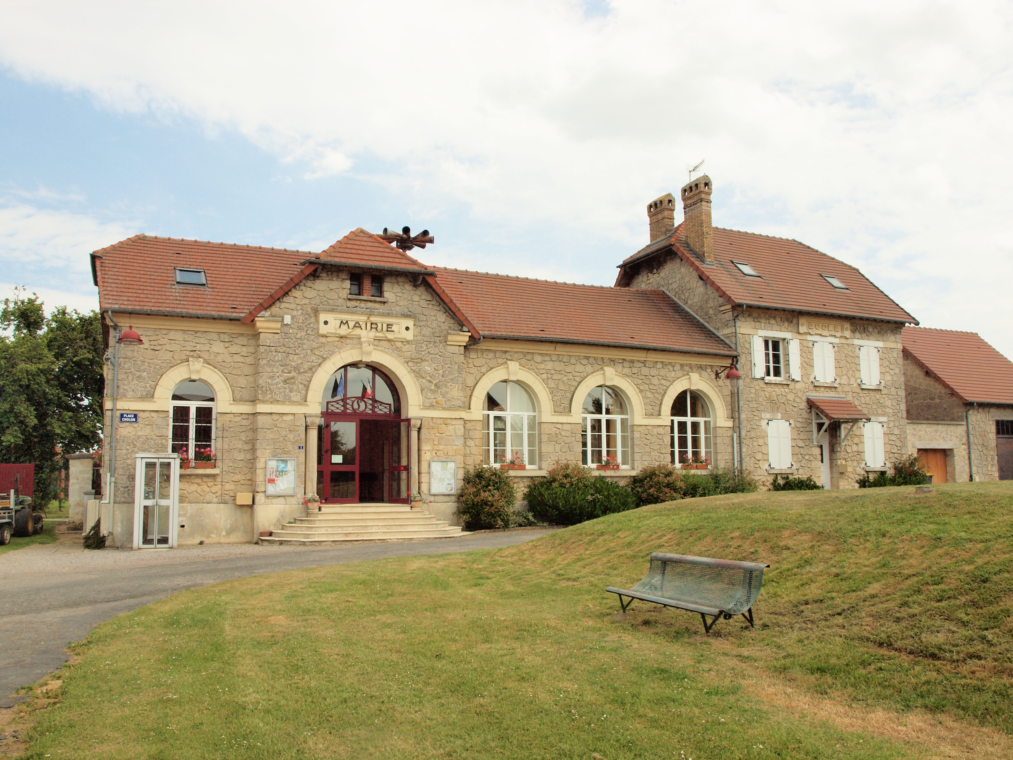 Mairie-école de Laffaux (Aisne, France)